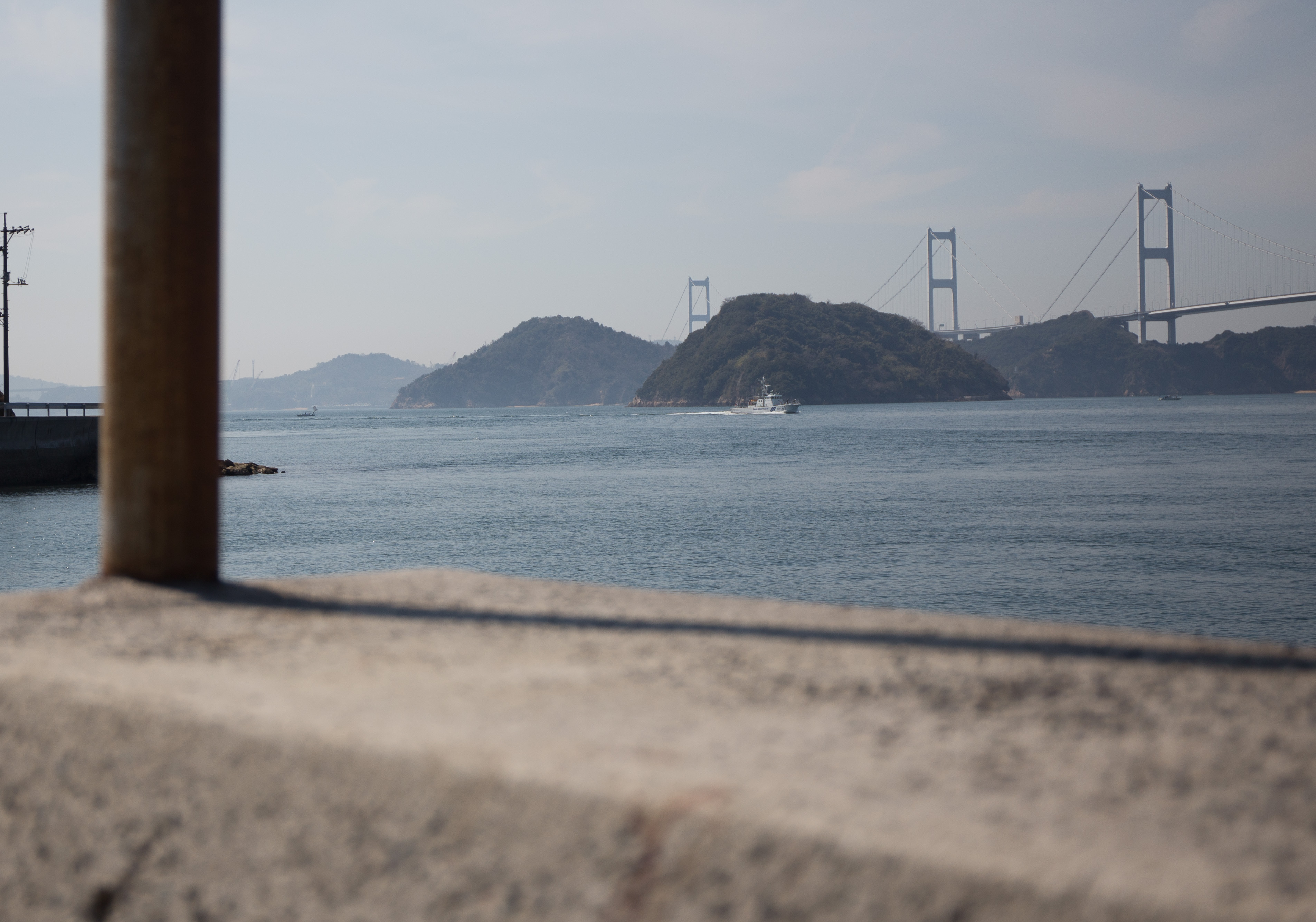 愛媛県大島の南部、今治市吉海町正味から眺めた中渡島（中途島）。中世は能島村上氏の要塞・中途城が置かれた瀬戸内海の要衝でした。